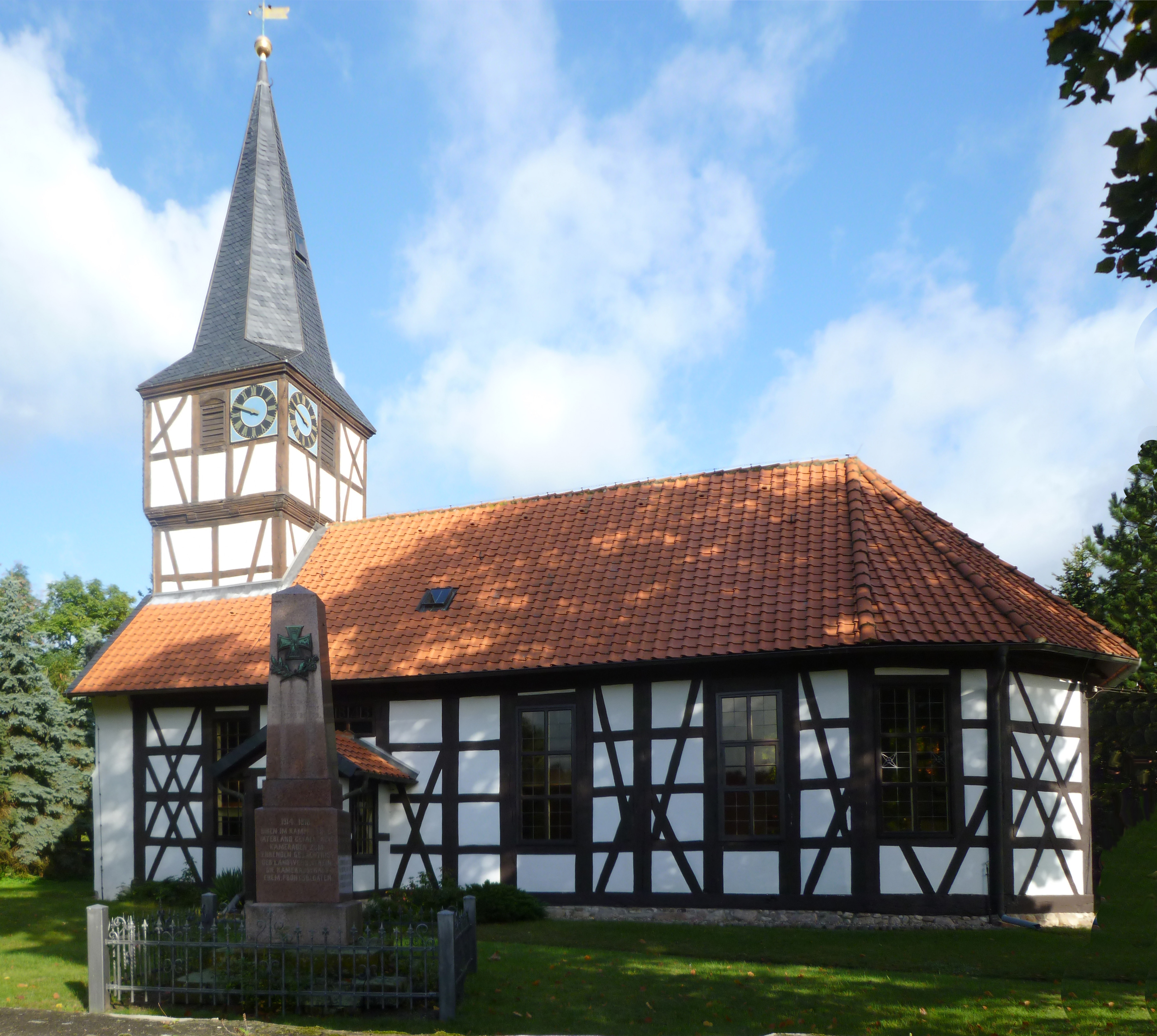 Ortskirche Zobbenitz mit Kriegderdenkmal